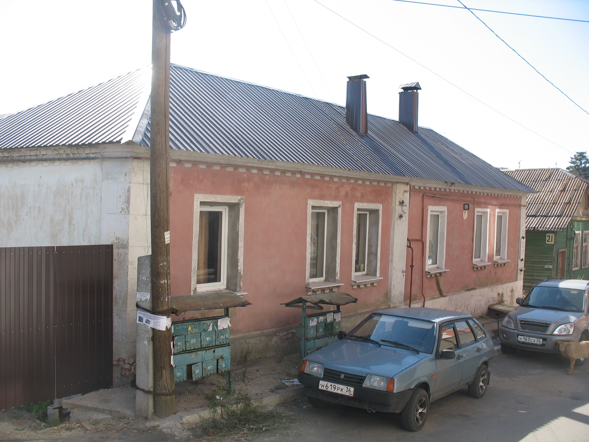 Дом, в котором жил поэт И. С. Никитин: улица Шевченко, 19, Воронеж, Воронежская область